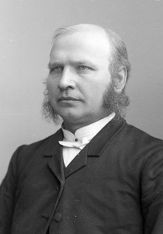 Andreas Henriksen Hval (1848–1910), stortingsmann (Høyre) for kjøpstedene Trondhjem og Levanger 1892–1894.